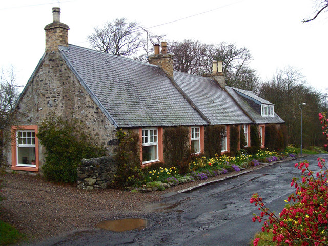 Cottages in Smailholm village